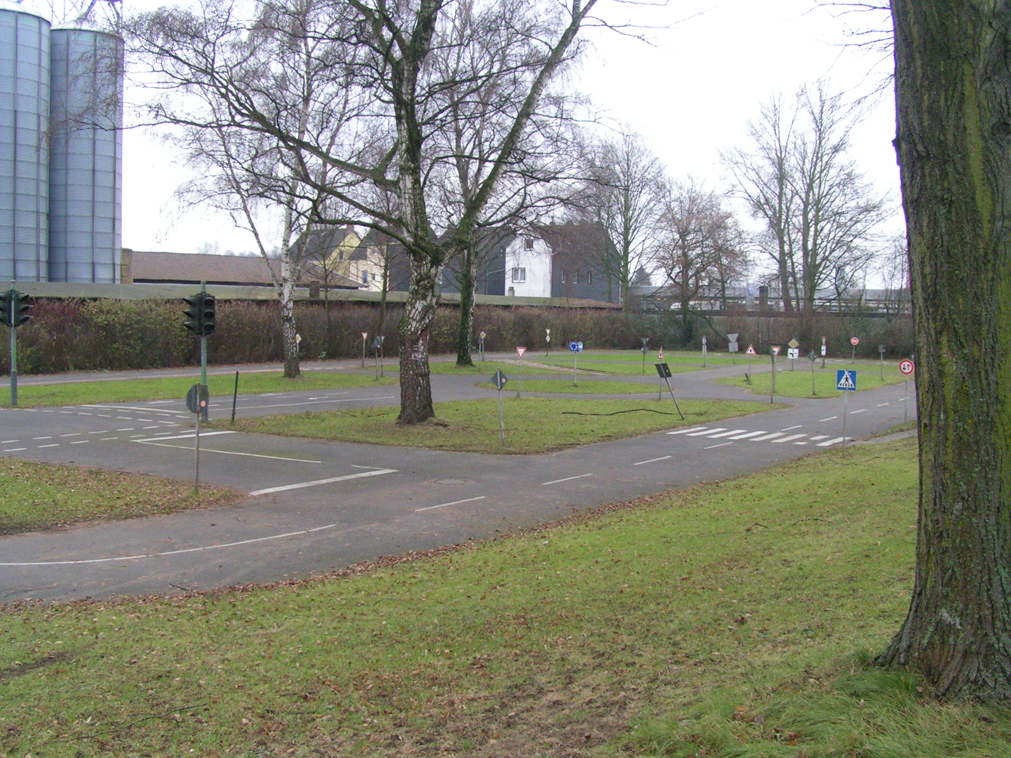 Städtische Verkehrsschule Leverkusen in Leverkusen-Opladen; existiert seit den 1970er Jahren.